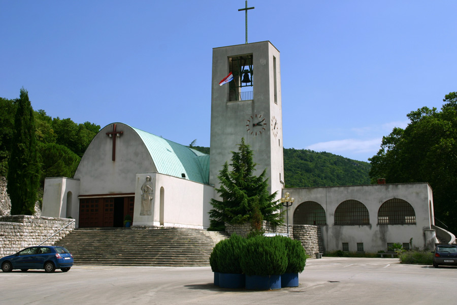 Crkva Sv. Barbare, Raša